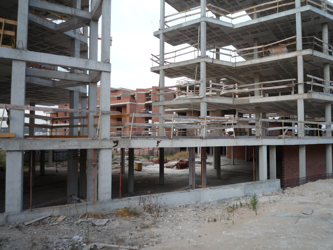 Investitionsruine in 'Cala de Bou',Ibiza; Spanien 2007-heute (2012)